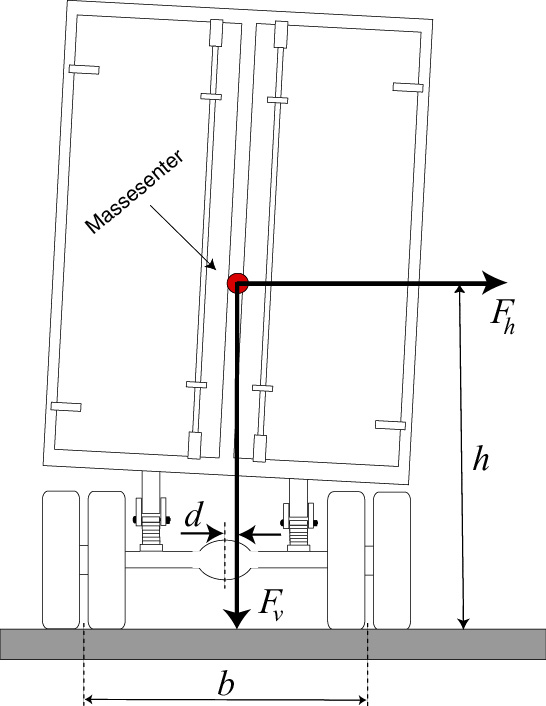 Skisse over krefter som verkar på lastebil i sving.